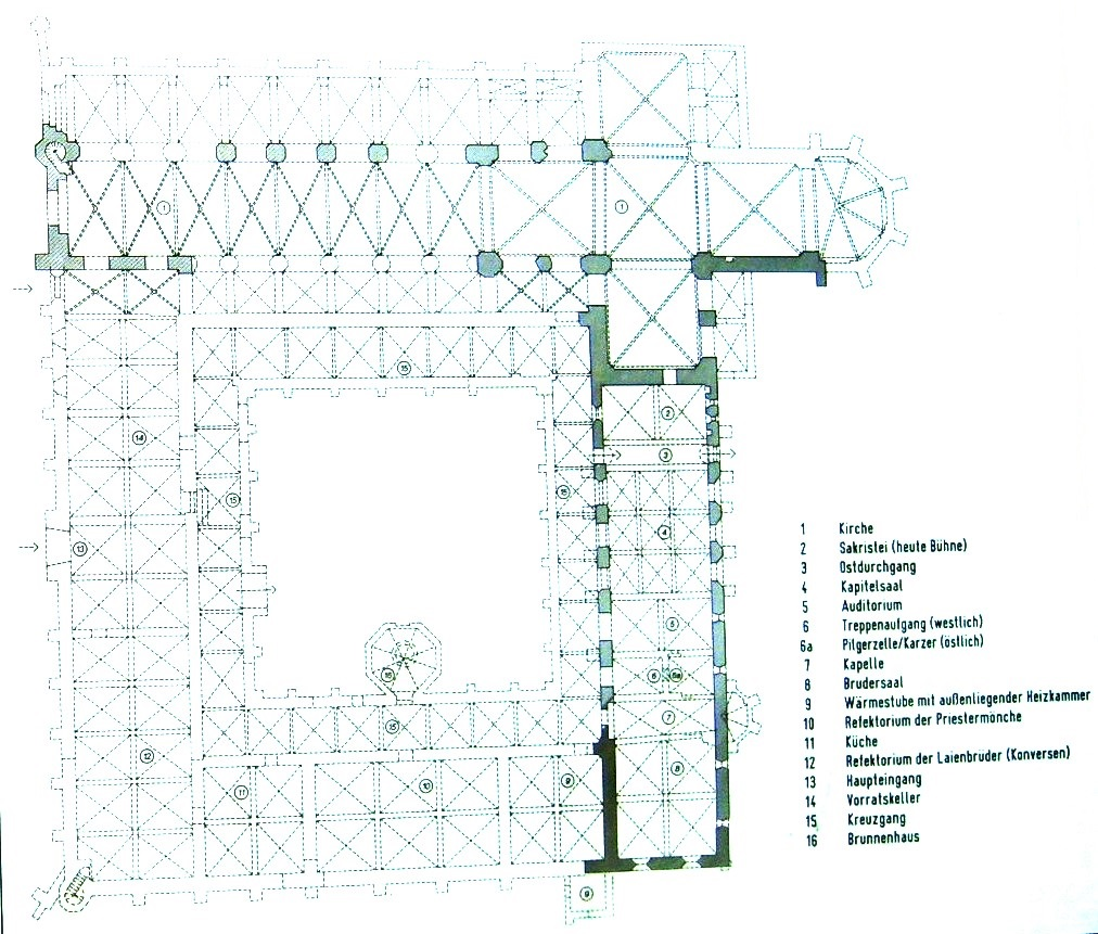 Kloster Eldena - Geschichte und Plan auf Infotafel